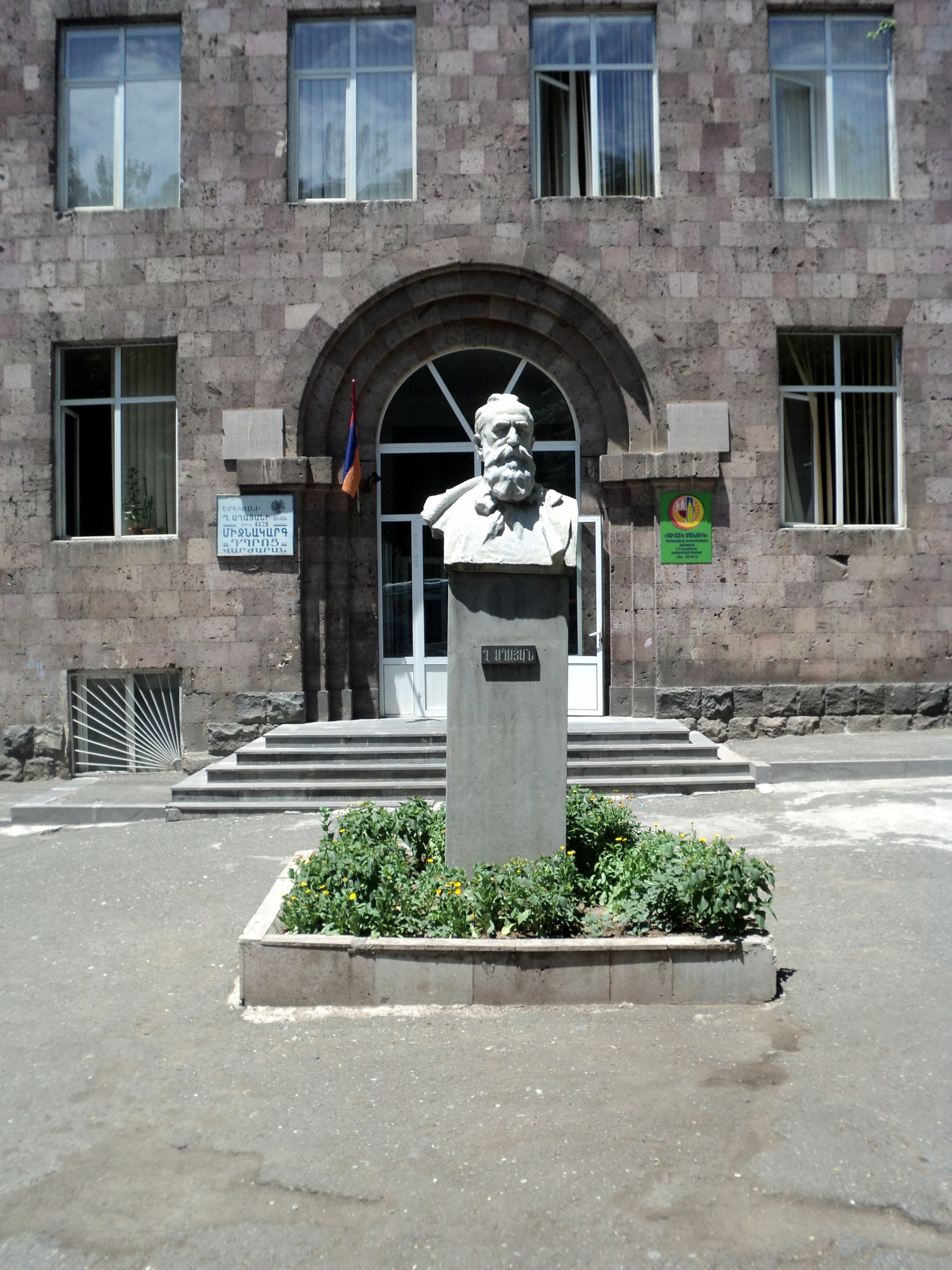 ՂԱԶԱՐՈՍ ԱՂԱՅԱՆ Քանդ.՝ Ե. Վարդանյան Կիևյան փող. 9, թիվ 63 համանուն դպրոցի առջև 3/8